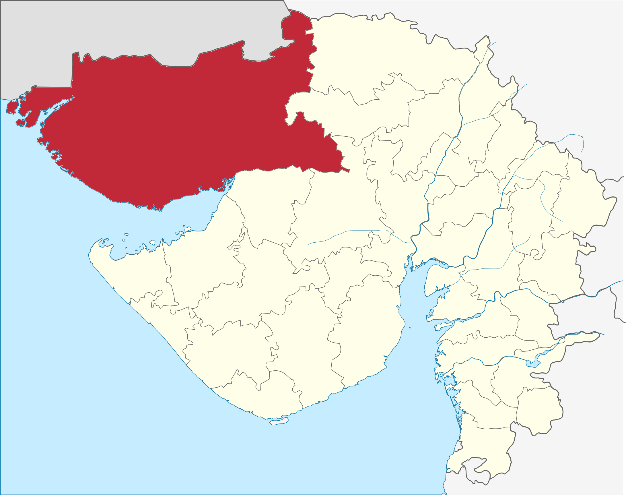 Distrito de Kachchh en Gujarat